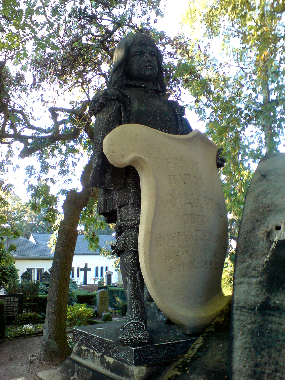 Eine Posse? Die verbliebene Figur von Carl Dopmeyer hält die erneuerte Grabplatte (nun aus Sandstein): "Ernst Baron v. Malortie, Ober-Hofmarschall, * 5. XI. 1804, † 11. X. 1884"